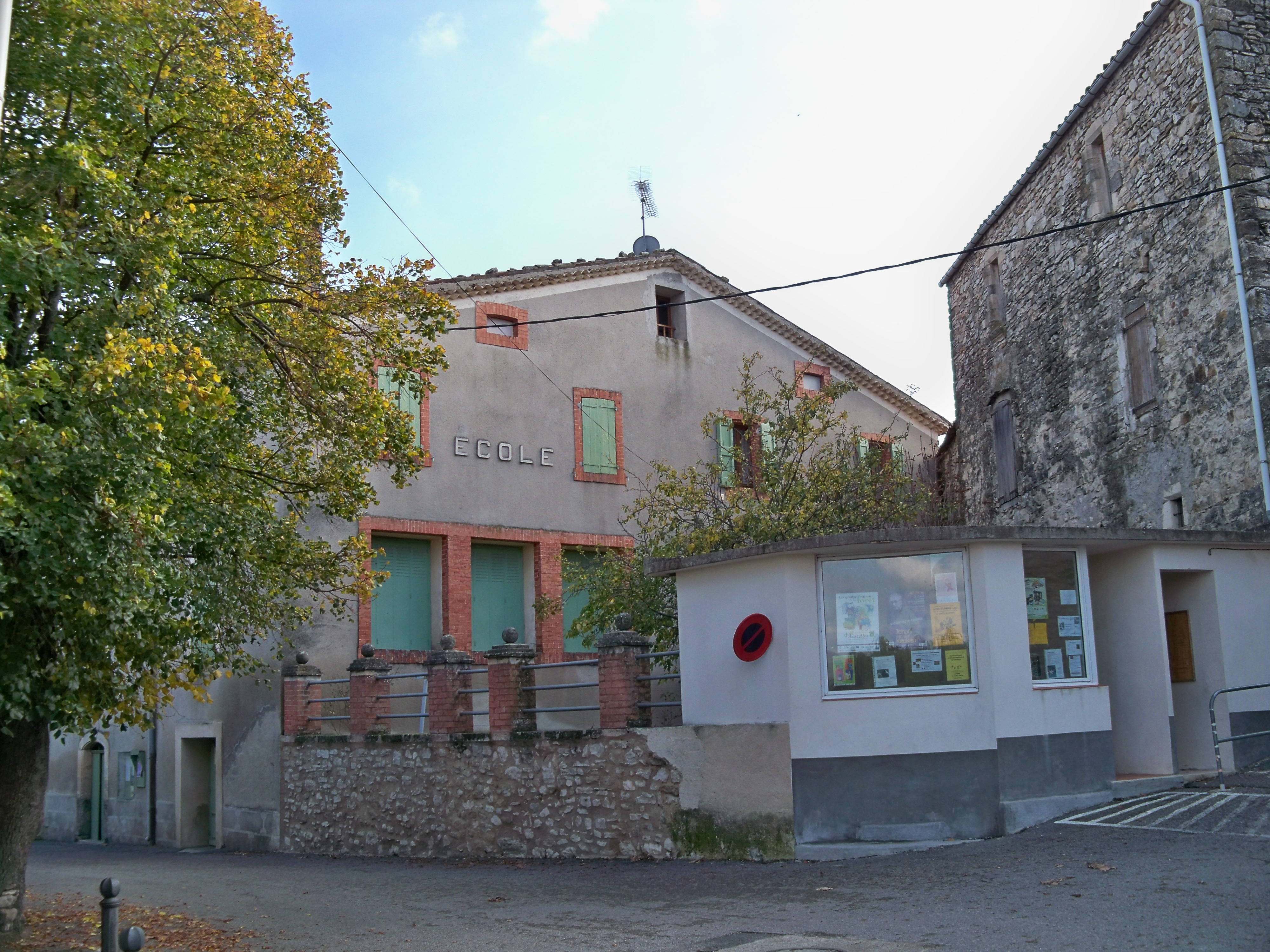 école de Limans (04)